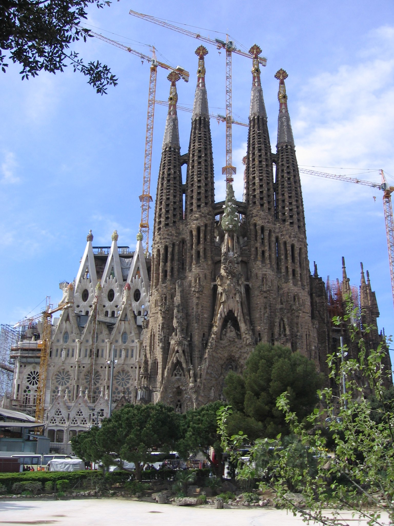 Sagrada Familia - Fachada del Nacimiento